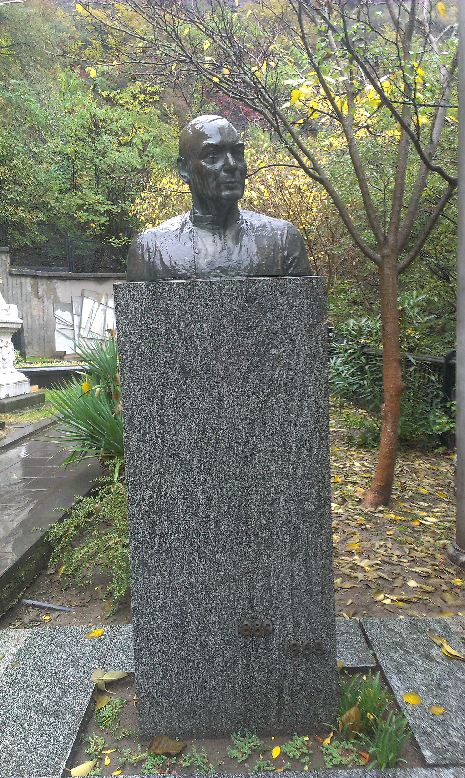 Пантеон Мтацминда